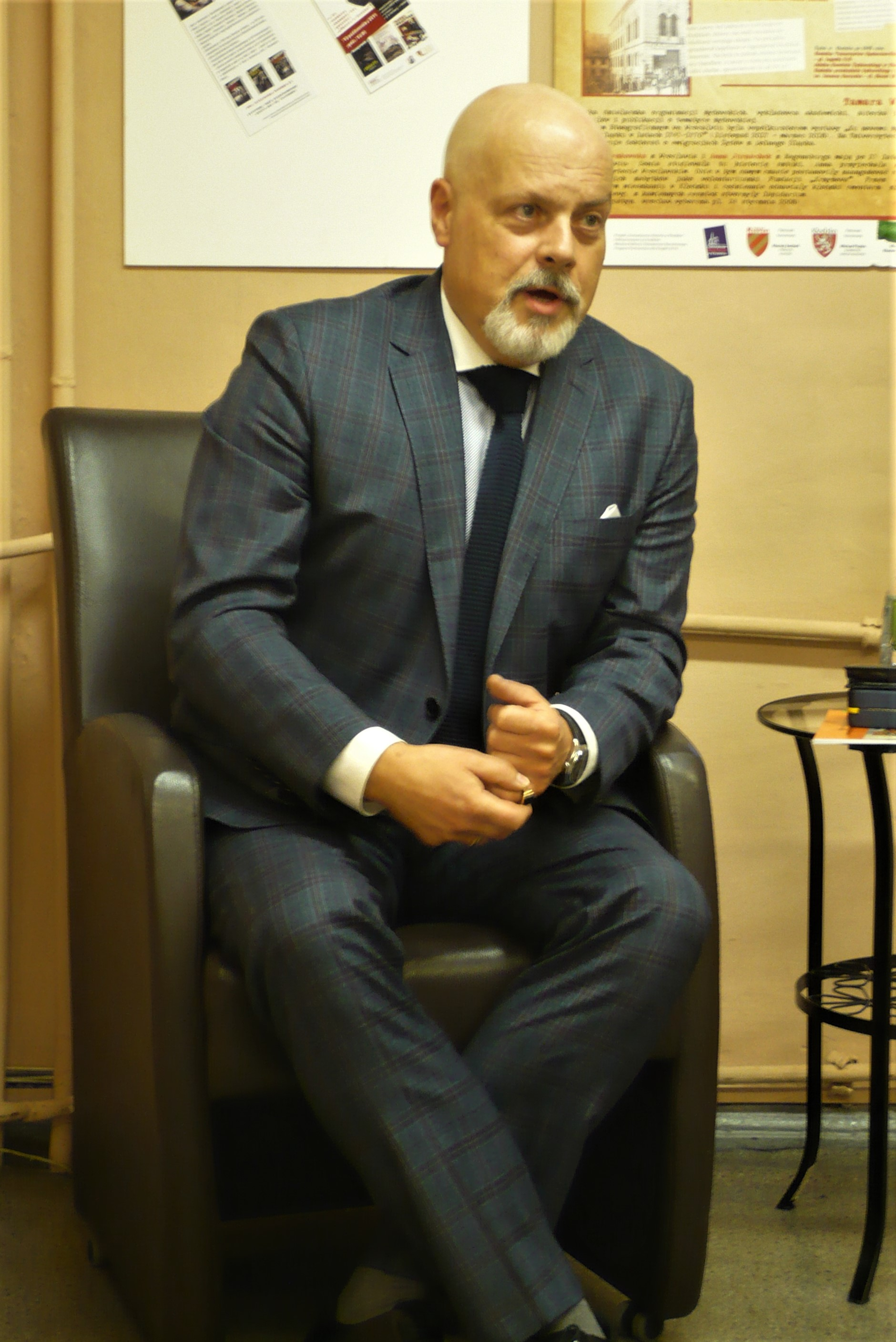 Marek Krajewski w Kłodzku, 10.10.2019